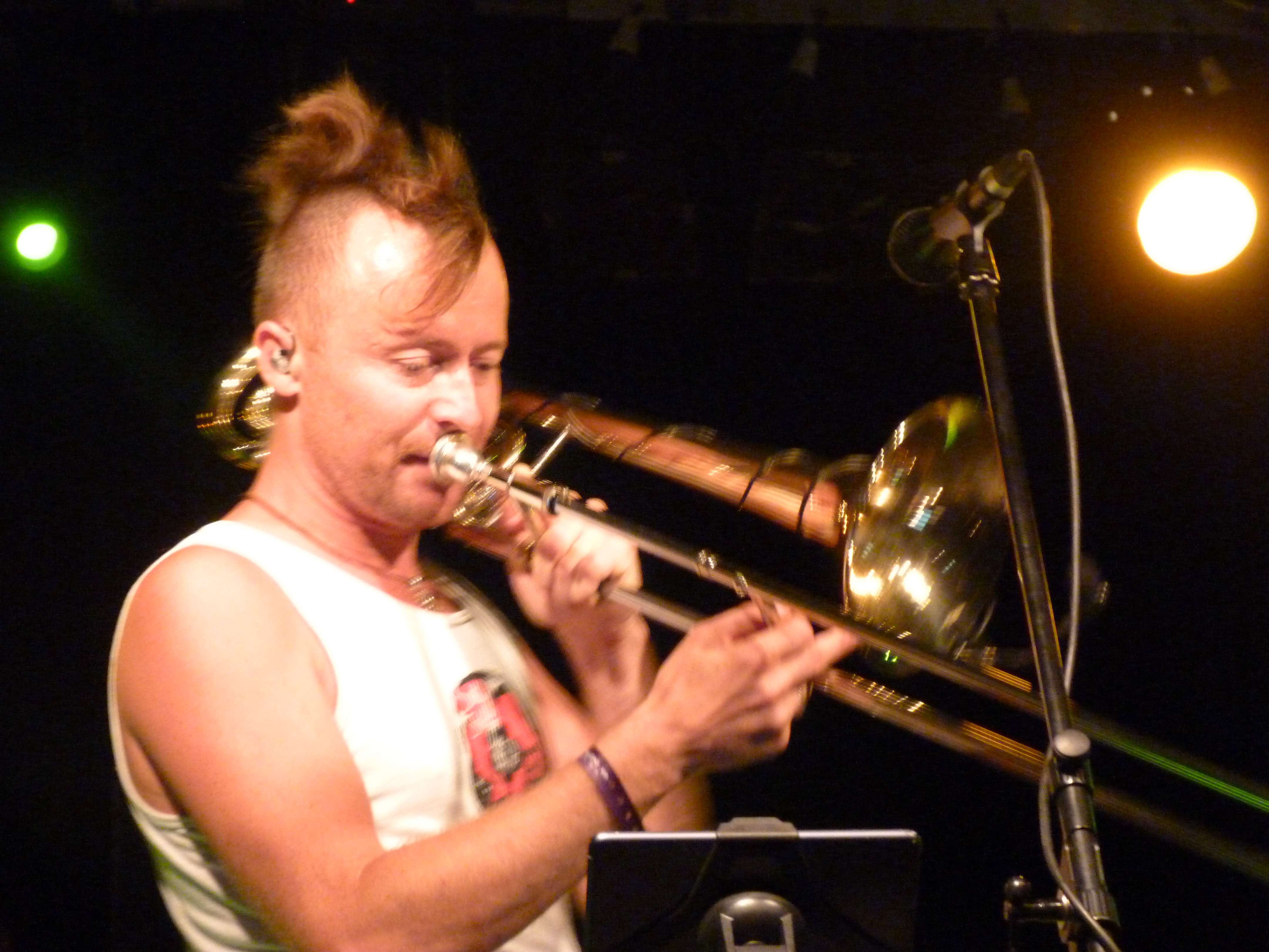 A felvétel 2014. augusztus 6-án, szerdán készült Nagyharsányban a focipályán. 7. Ördögkatlan Fesztivál. Svjata Vatra együttes (Észt-ukrán). ©© Derzsi Elekes Andor, Budapest, 2014, A kép és filmfelvételek egészben, vagy részletekben másolását, bármilyen úton történő sokszorosítását és felhasználását a szerző ellenérték nélkül, jogutódjaira is kihatóan megengedi. Az engedély kiterjed a kereskedelmi célú hasznosításra is. Kéri azonban nevének feltüntetését a felhasználás során. A Metapolisz sorozat valamennyi képe és filmje Creative Commons alatti valamint kereskedelmi - for profit - célra is felhasználható. Ajánlott hivatkozás: Derzsi Elekes Andor: Metapolisz DVD line